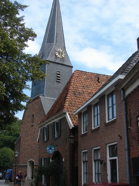 Bredevoort, st. Joriskerk